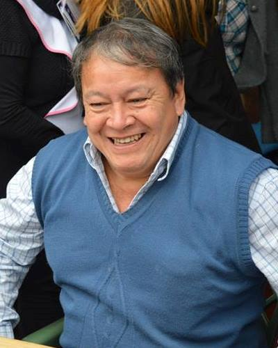 Presidente del Movimiento Social por la República. Dirigente social, fundador de la Cooperativa La Juanita y del MTD La Matanza.